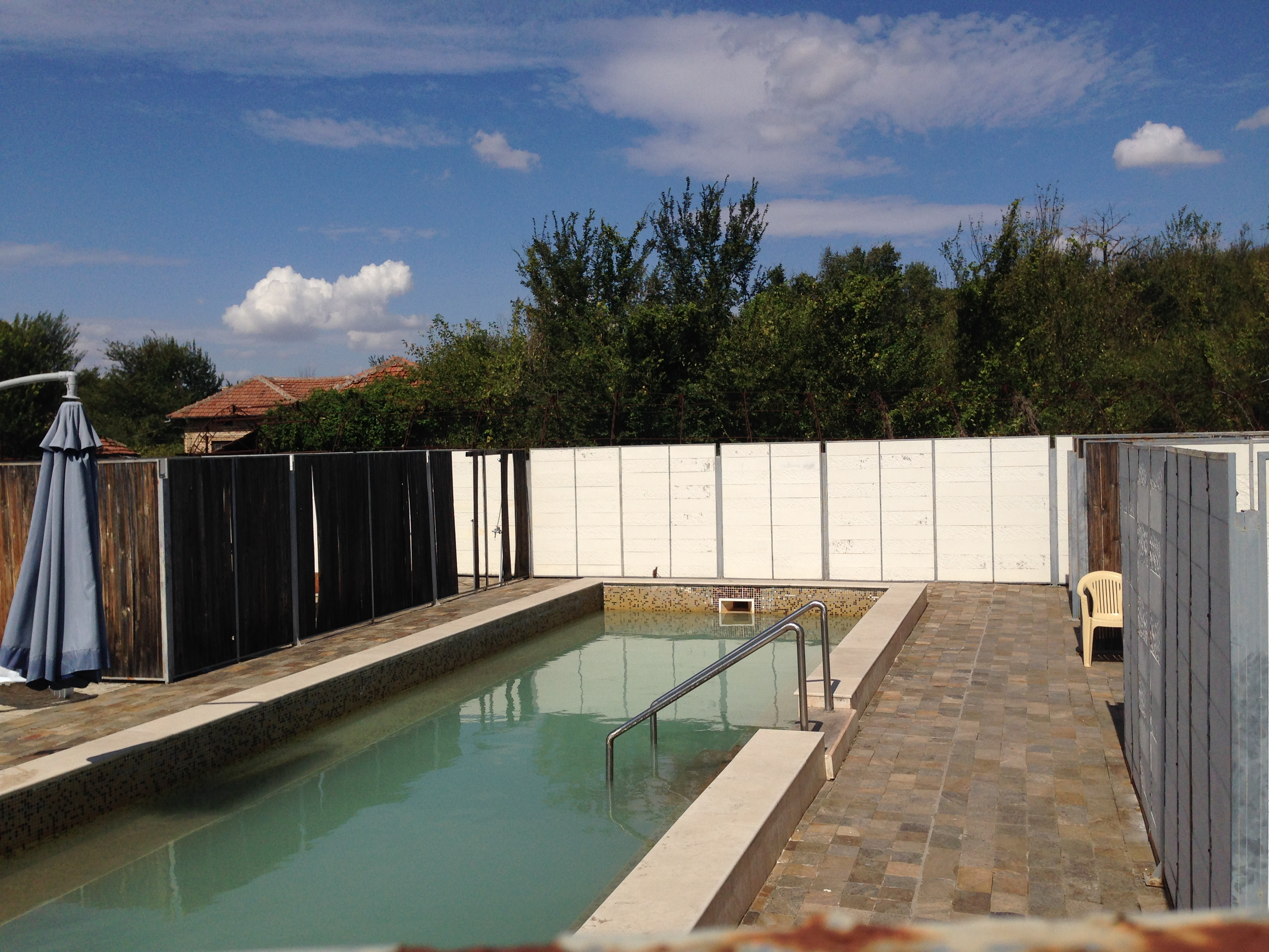 Външен минерален басейн в с. Обединение